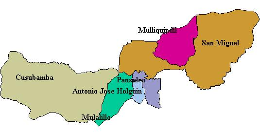 Parroquias rurales del Canton Salcedo en la Provincia de Cotopaxi en el centro de Ecuador